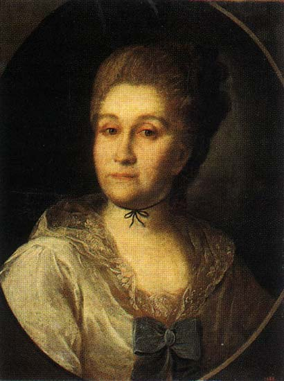 Талызина Мария Степановна (урождённая Апраксина) (1742 - 1796), вторая дочь фельдмаршала С.Ф. Апраксина.